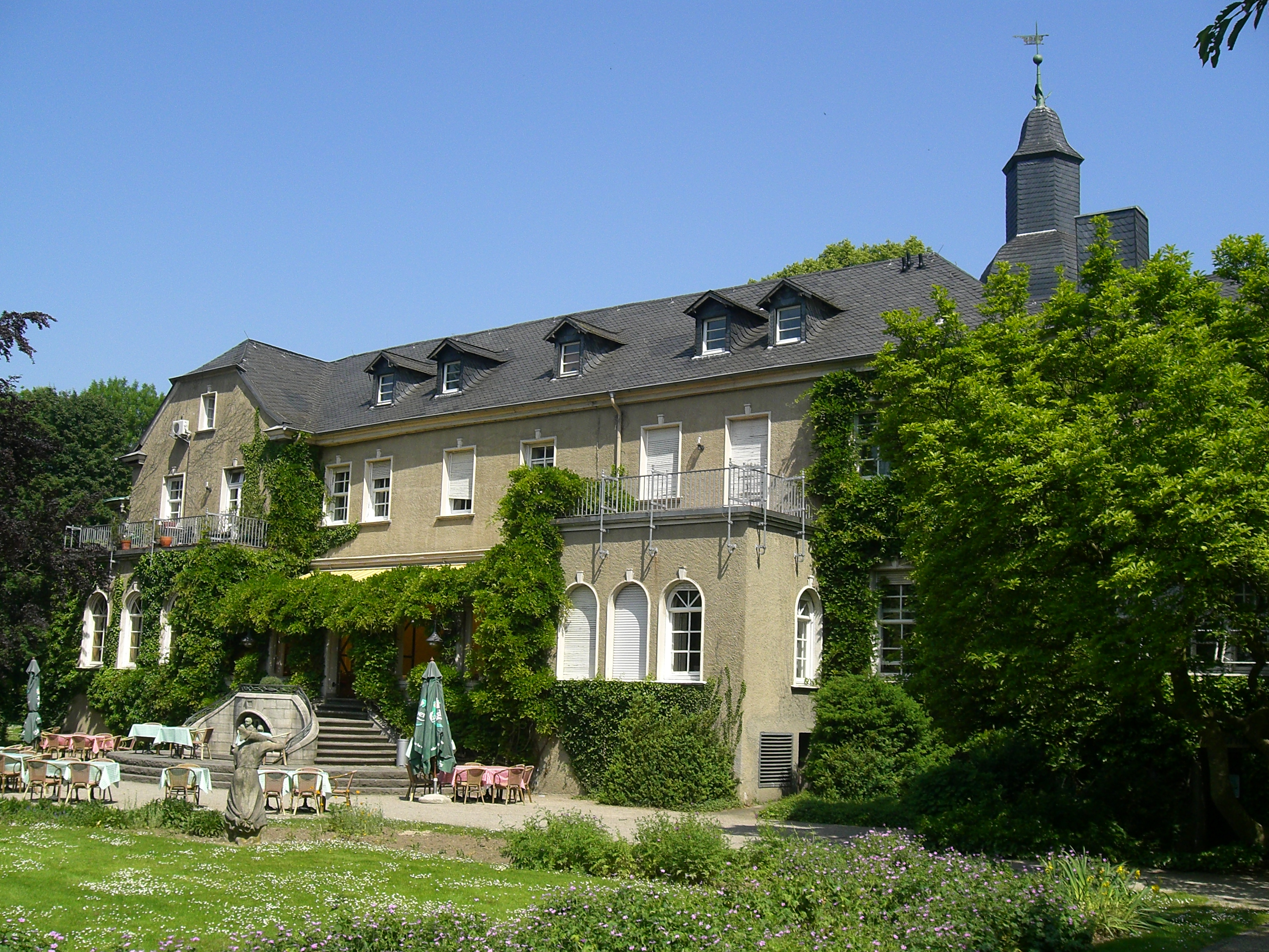 Schloss Styrum in Mülheim